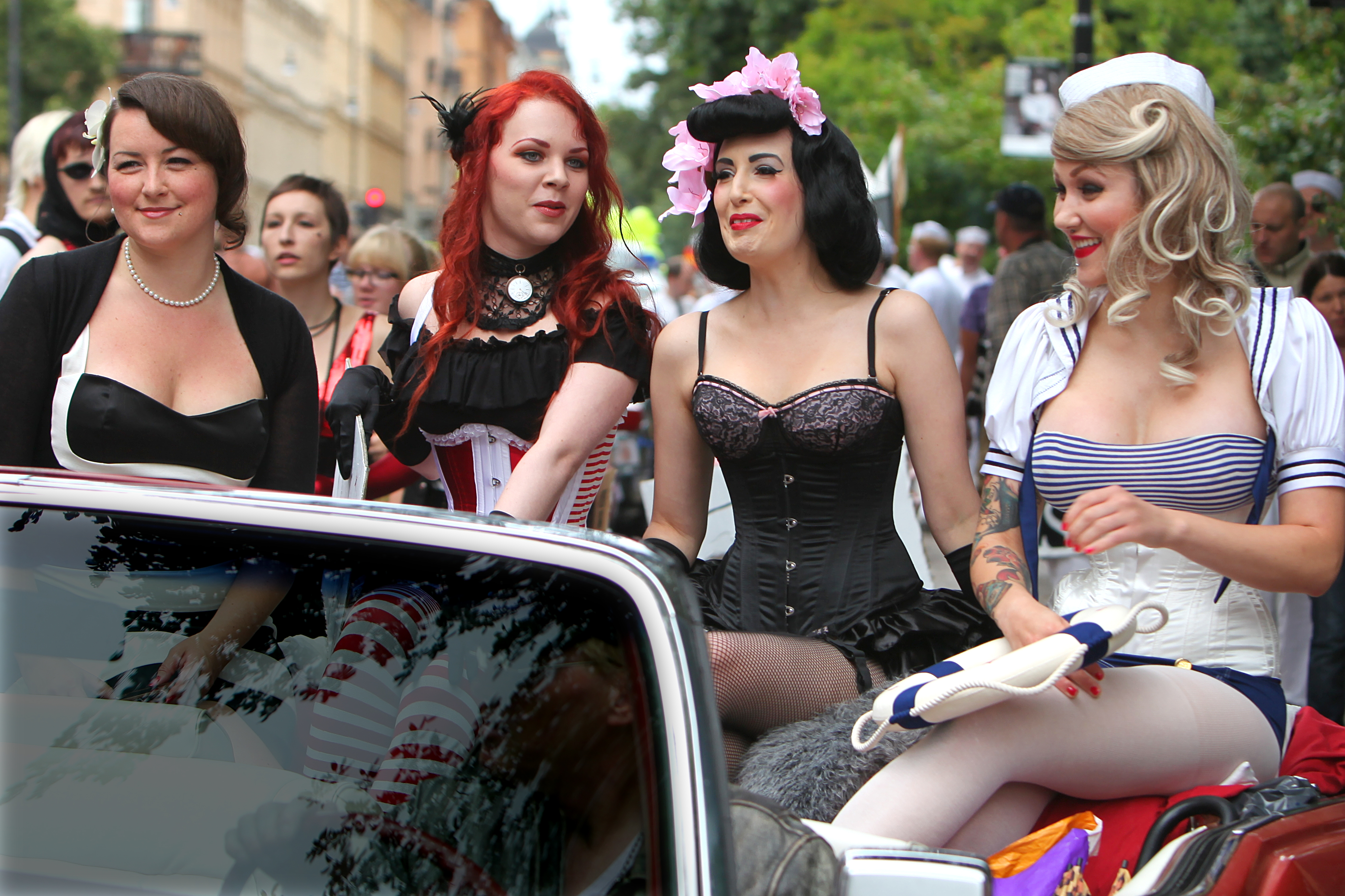 Girls at Stockholm Pride 2009